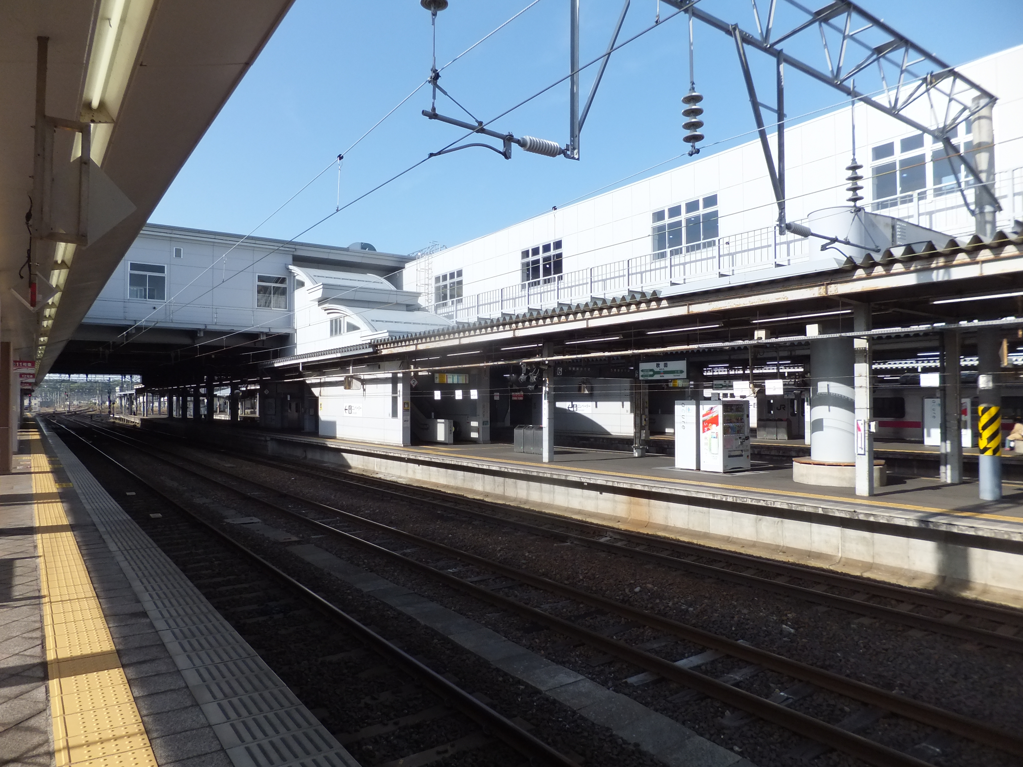 秋田駅11番線ホームより撮影